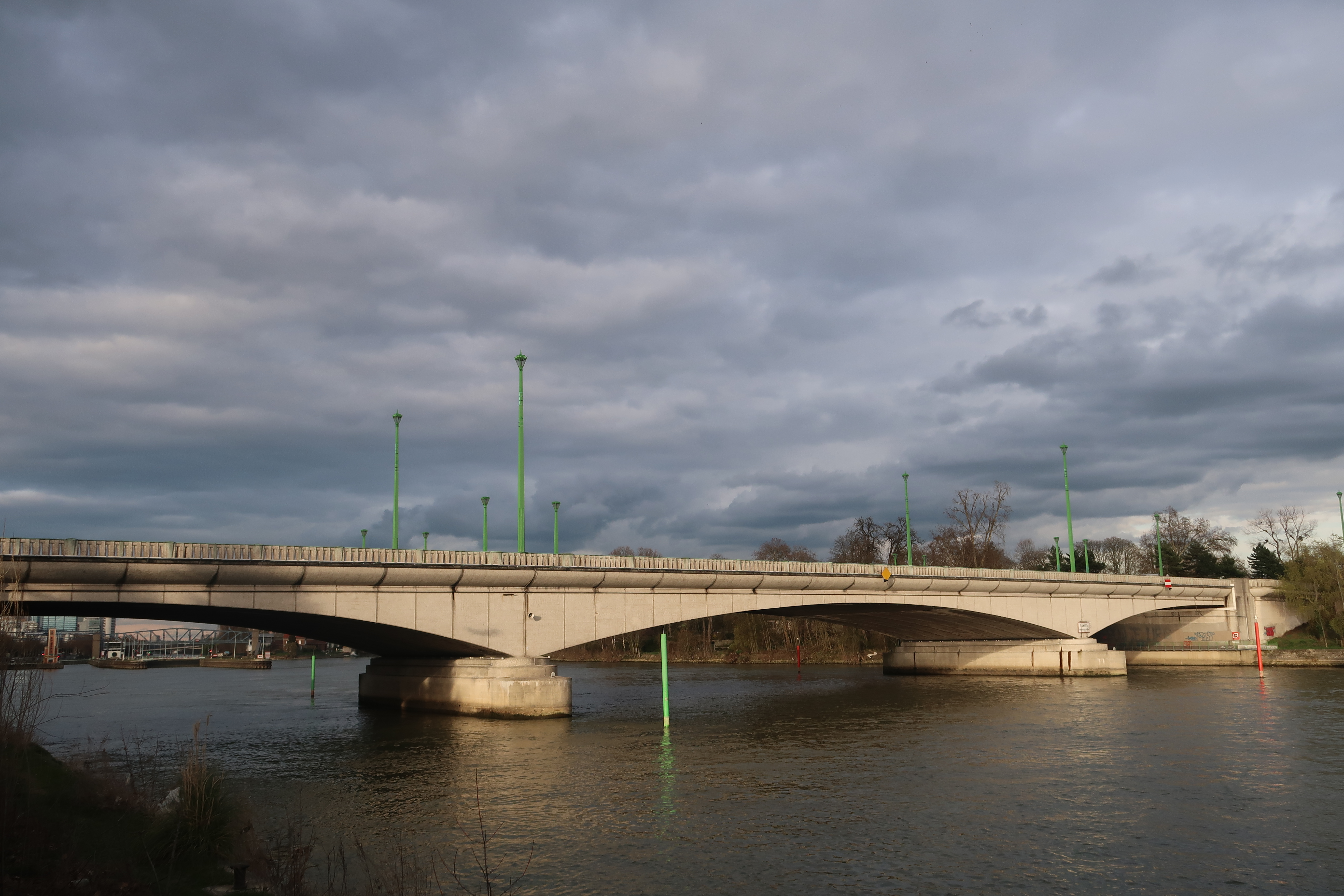 Pont de Suresnes (Hauts-de-Seine).